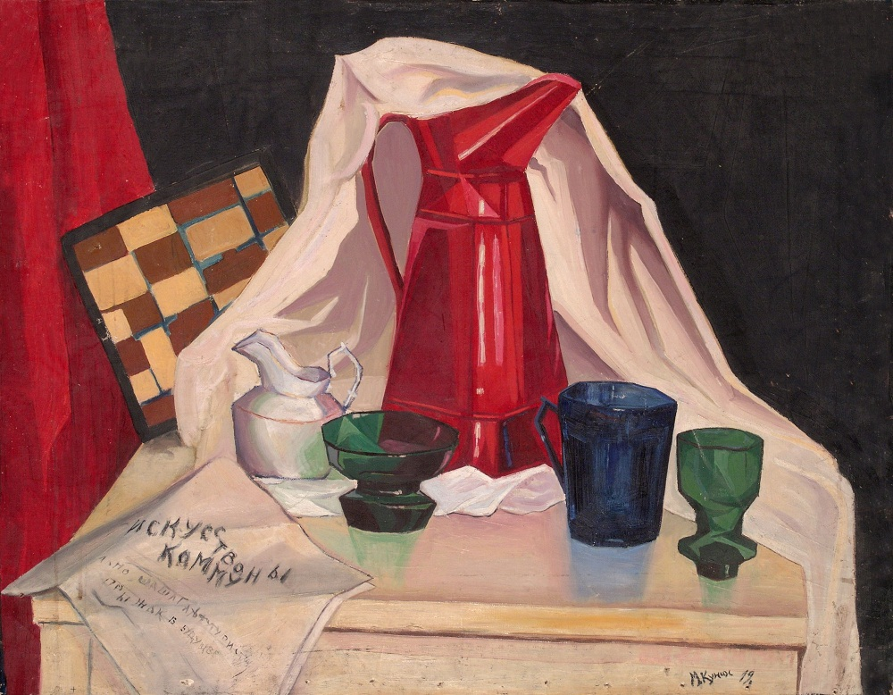 Холст, масло. 71×89,6. Национальный художественный музей Республики Беларусь